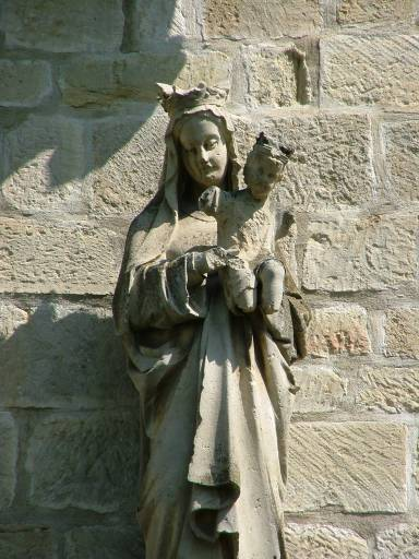 Statuie a Fecioarei Maria cu Pruncul Isus, Biserica Calvaria